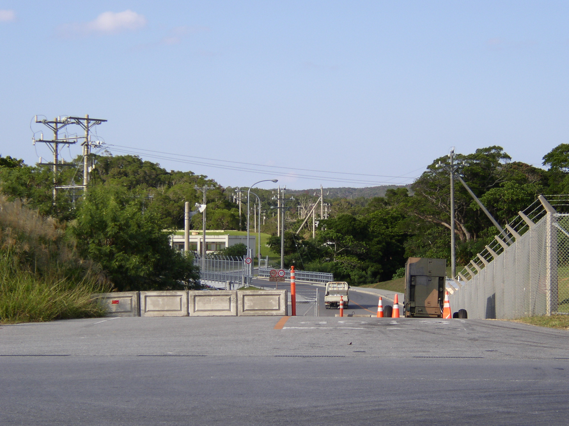 嘉手納弾薬庫入口